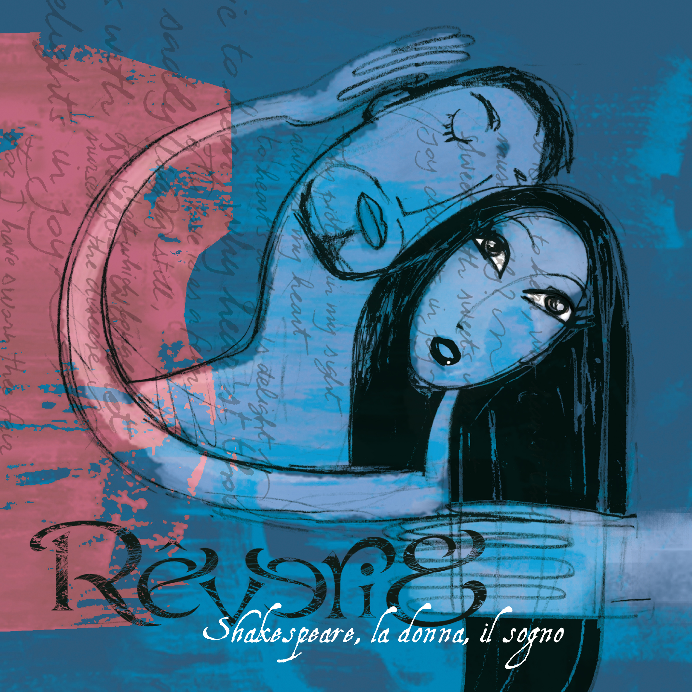 La kovrilo de "Shakespeare, la donna, il sogno", disko de la muzikgrupo Rêverie (2008).